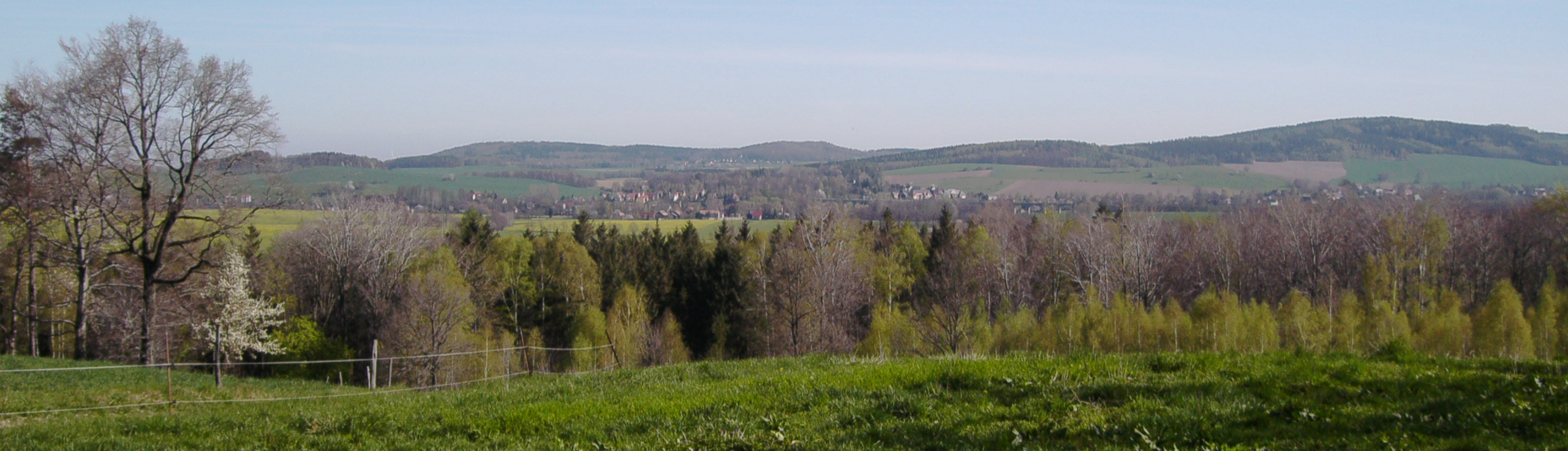 Sicht von Süden auf Puzkau